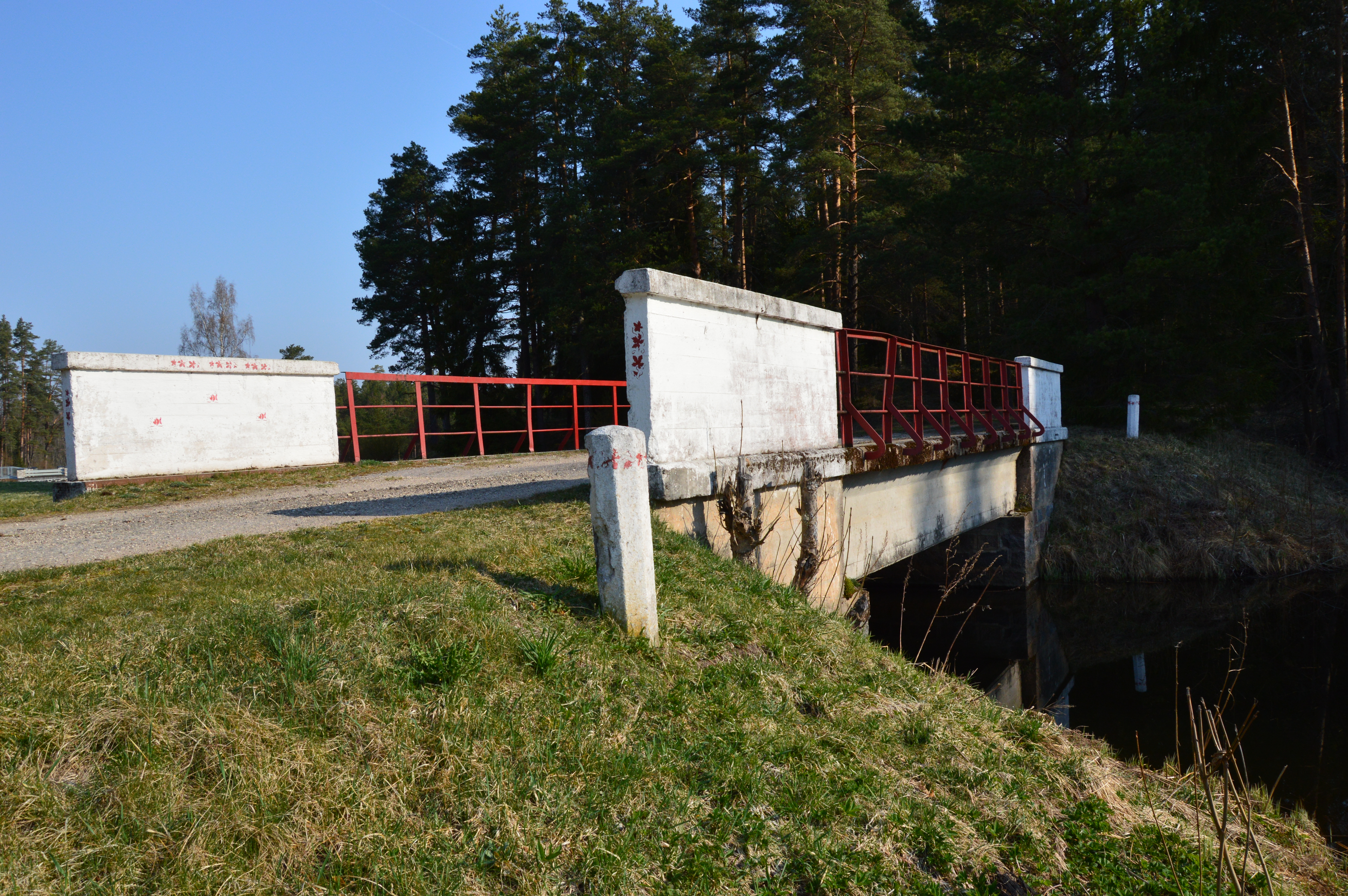 Sild Kaku külas üle Rõuge jõe.